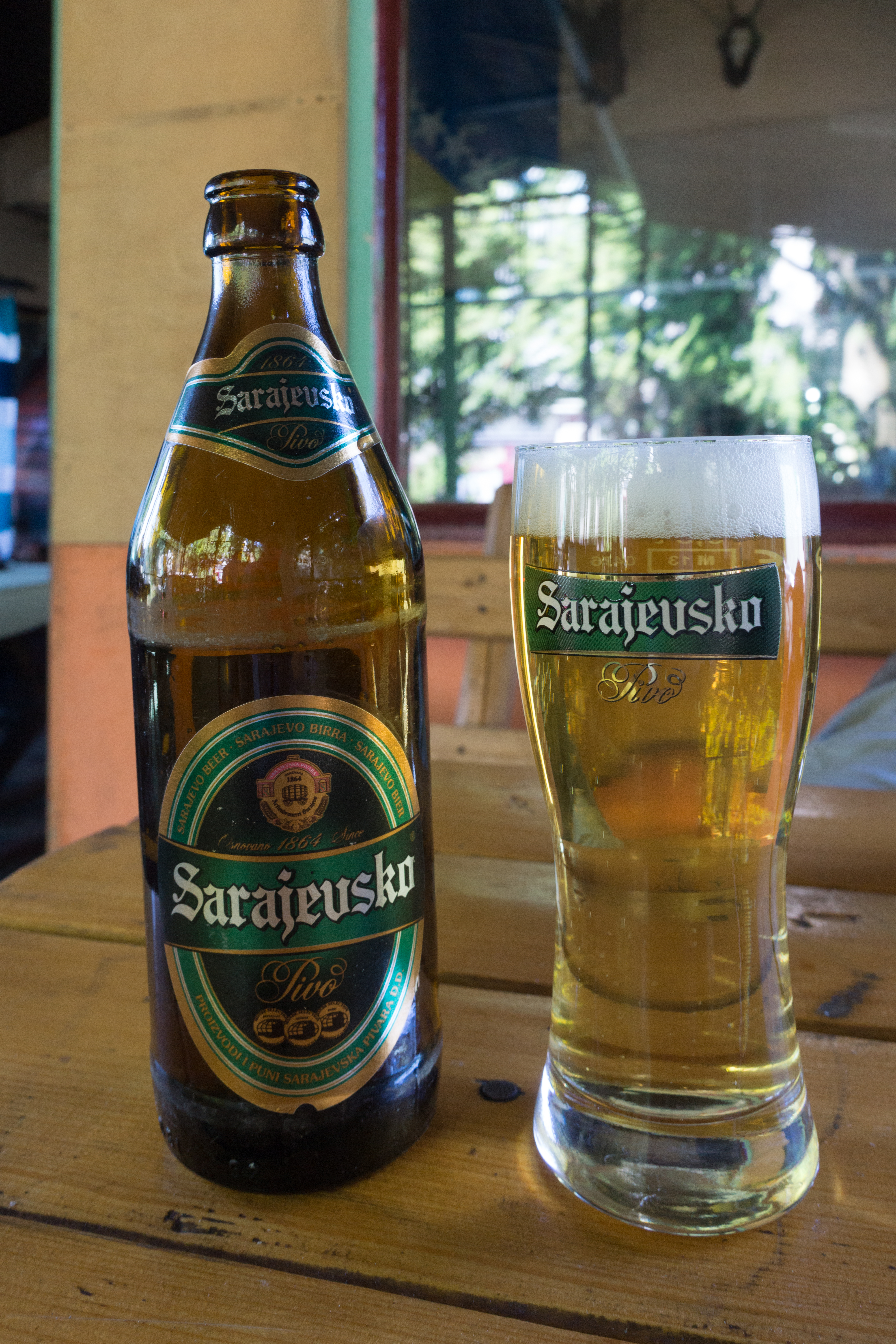 Bouteille et verre de Sarajevsko